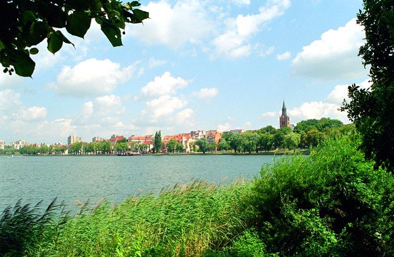 Lake Elk near Elk in Polesie (Poland)